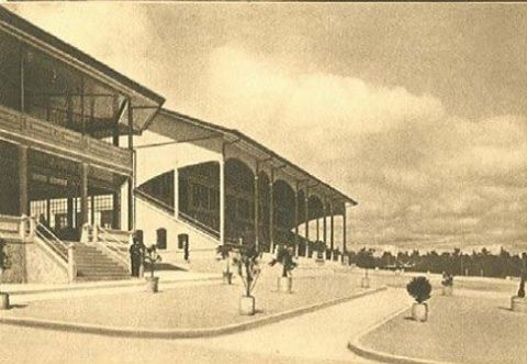 Hipódromo del Sur en su inaguración